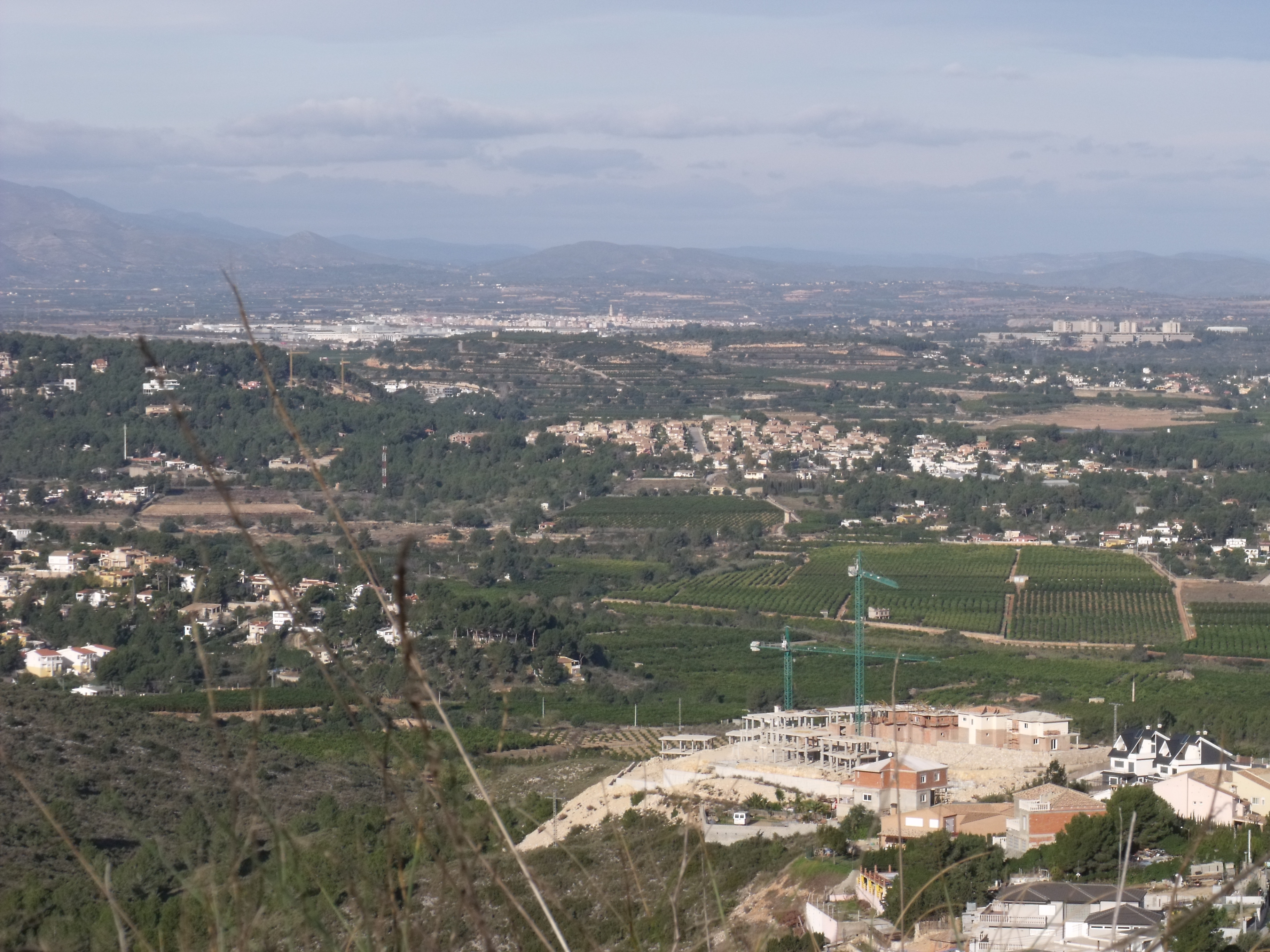 Cheste y varias urbanizaciones de la comarca, vistas desde el SE.